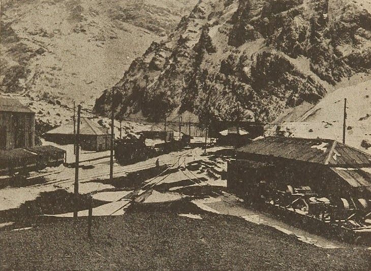 Estación Juncal, Chile.